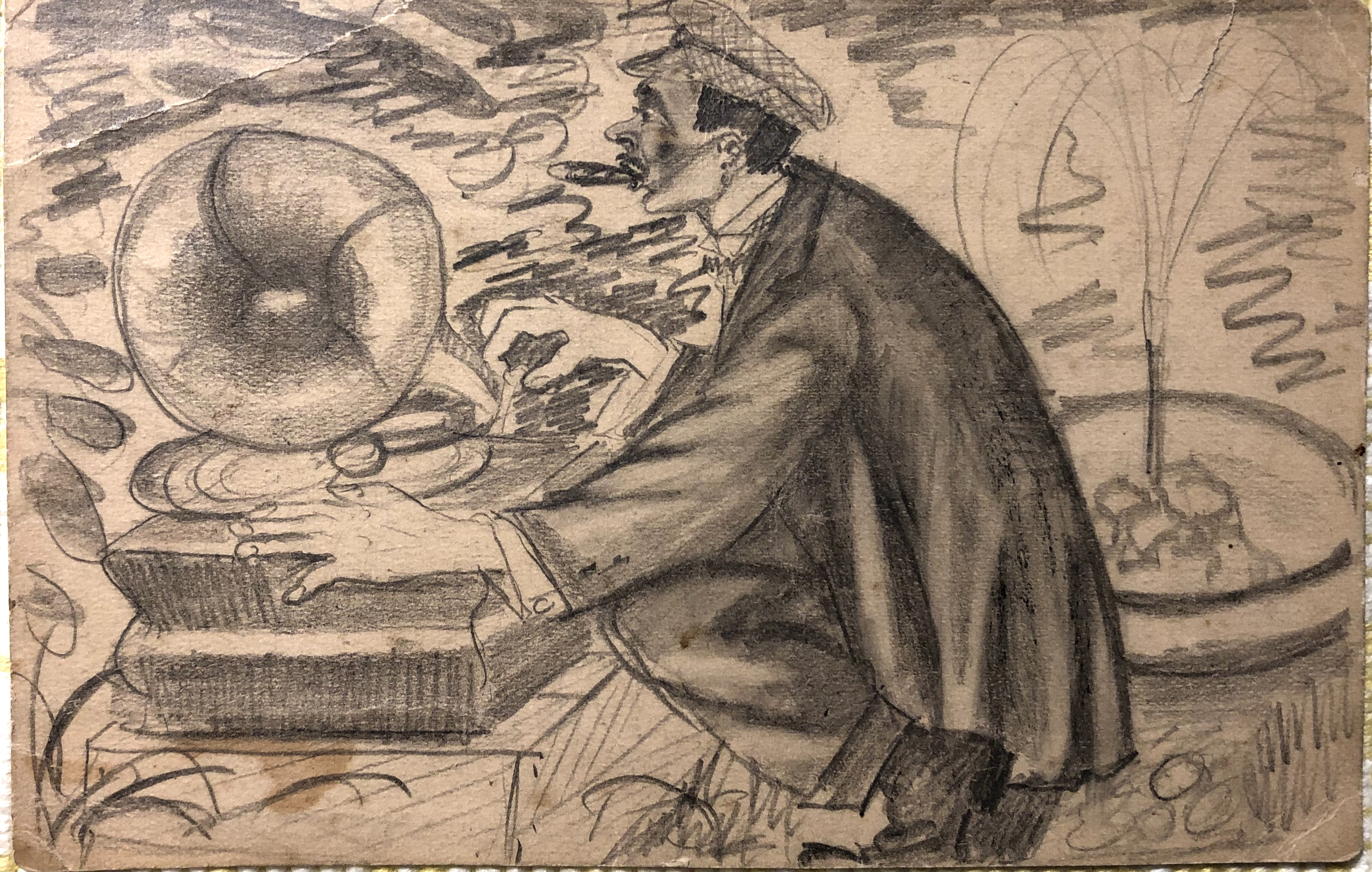 Ett vykort tecknat av Ernst Sjöstedt som föreställer honom själv med grammofon